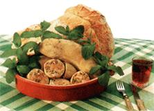 Maranho, prato tÃ­pico